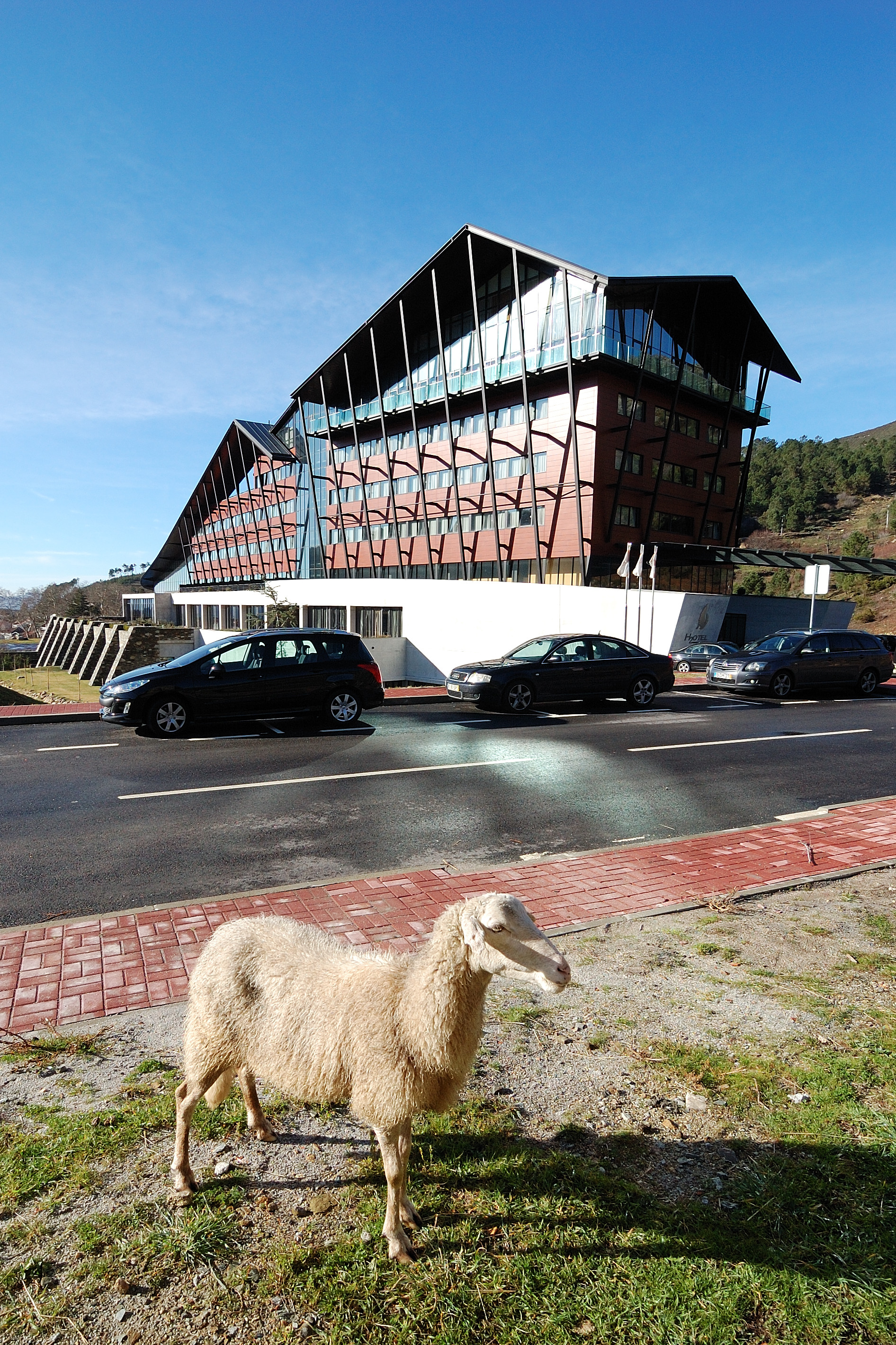 Unhais da Serra, Serra da Estrela, Portugal [2010]